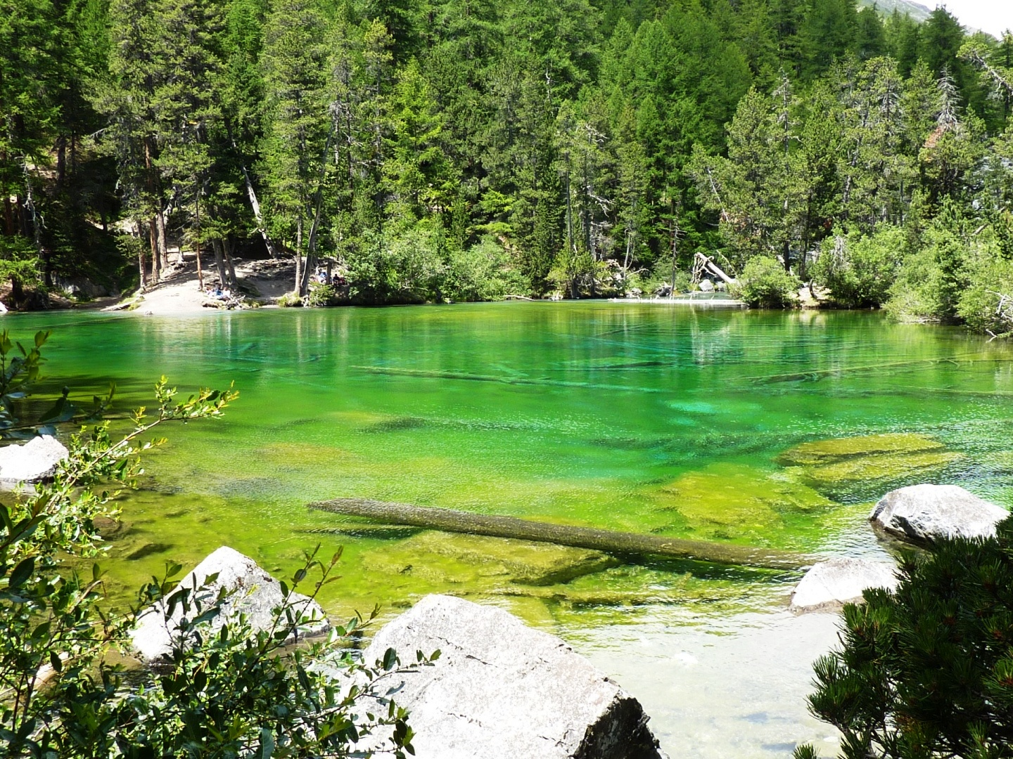 Le lac Vert et situé dans la Vallée Étroite (45° 4' 46.00" N 6° 36' 54.00" E). De faible profondeur il tient sa couleur des algues qui couvrent son fond.